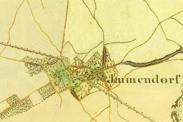 Preußische Kartenaufnahme 1846 - Uraufnahme - (5002 Geilenkirchen)